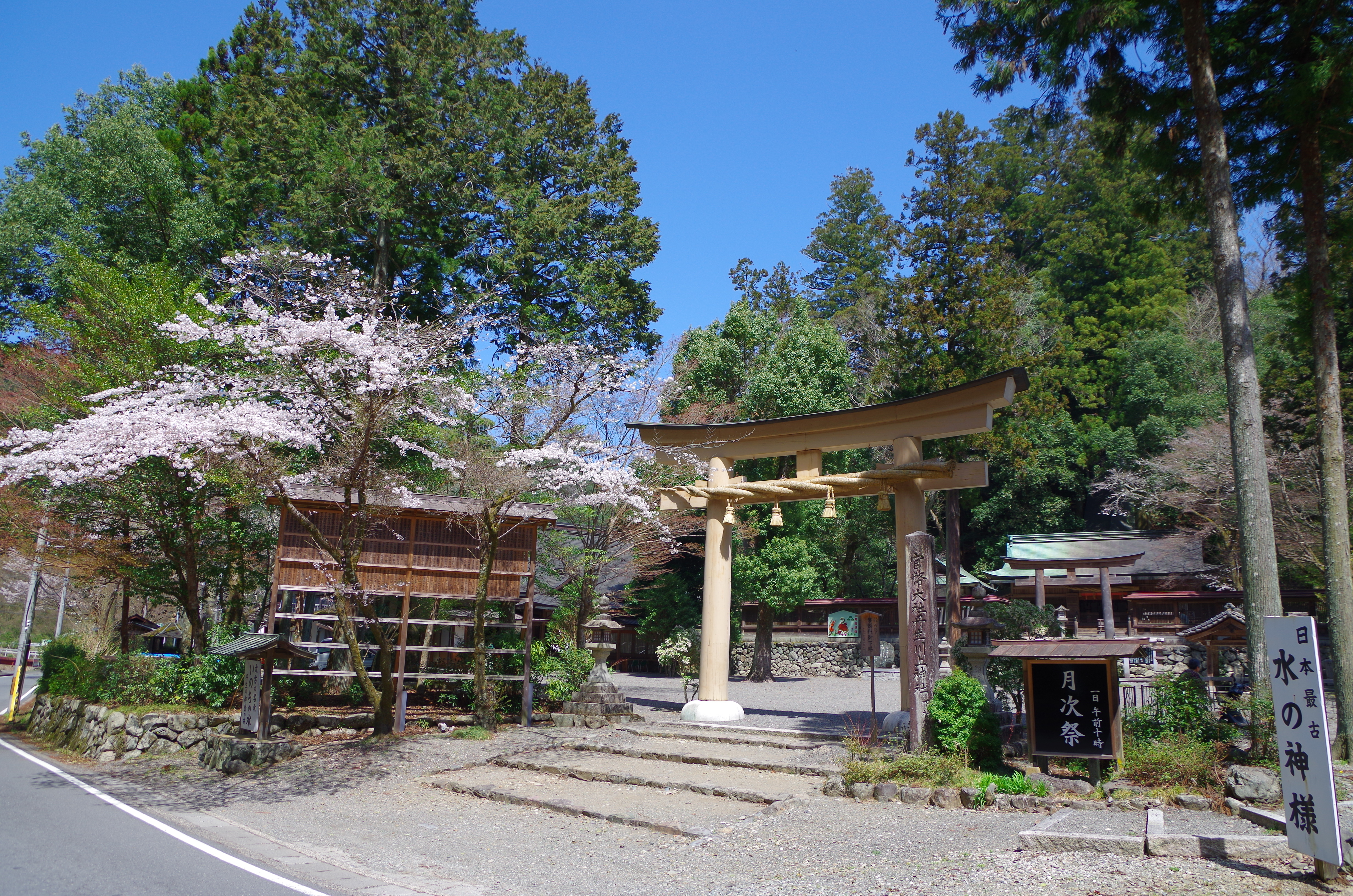 丹生川上神社下社 Niu-kawakami-jinja Shimosha 2013.4.05